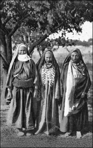 Текинки. Текинские женщины страстно любят всякие украшения и погремушки и носят ручные и ножные браслеты. Поверх своего черного балахона они надевают какие-то шарфы, и шарфы эти унизаны серебряными монетами в огромном количестве. Я не раз удивлялся выносливости этих красавиц, носящих на своих плечах подобную тяжесть; но, вероятно, пословица «своя ноша шеи не давит» находит отклик и у текинцев.